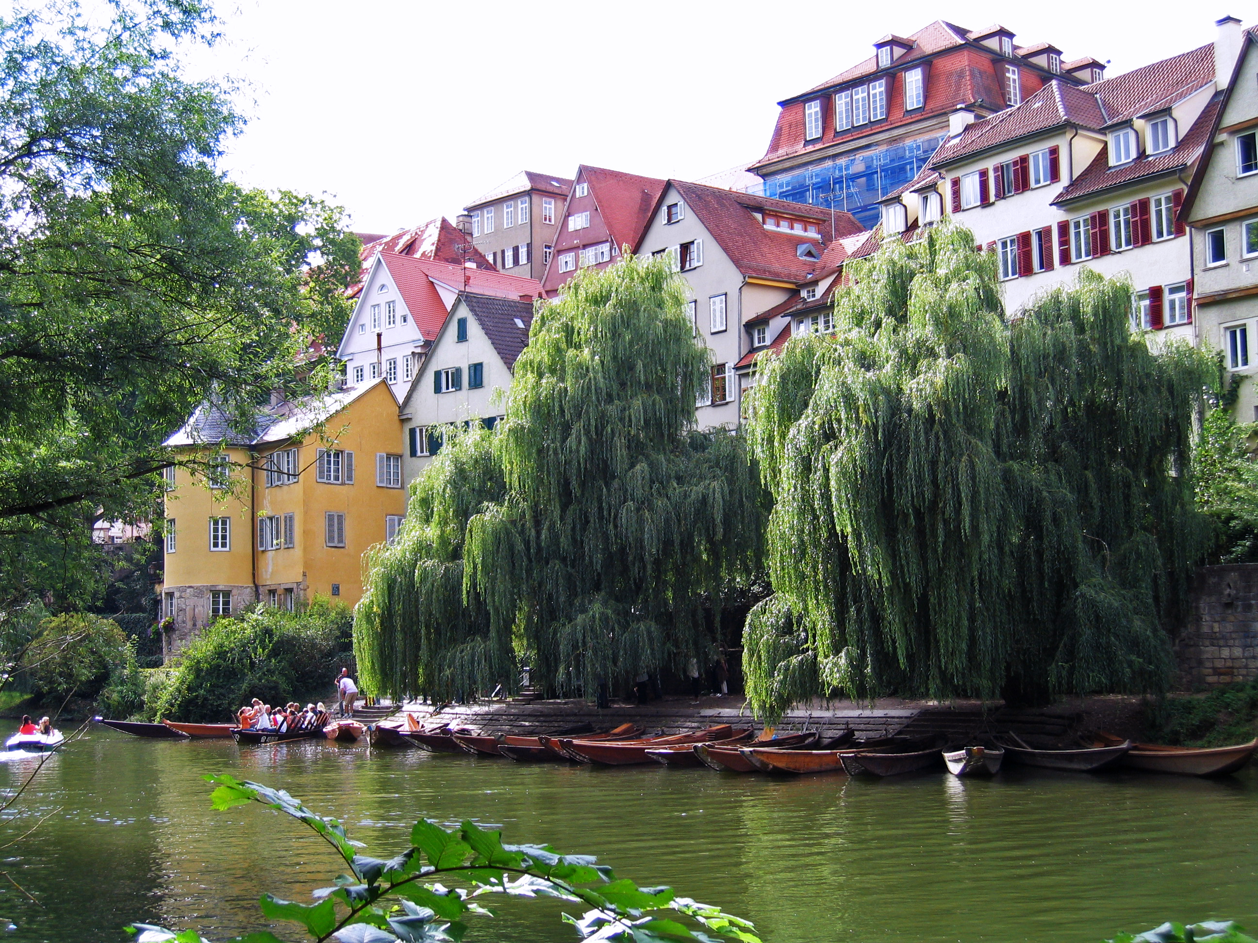 Tübingen